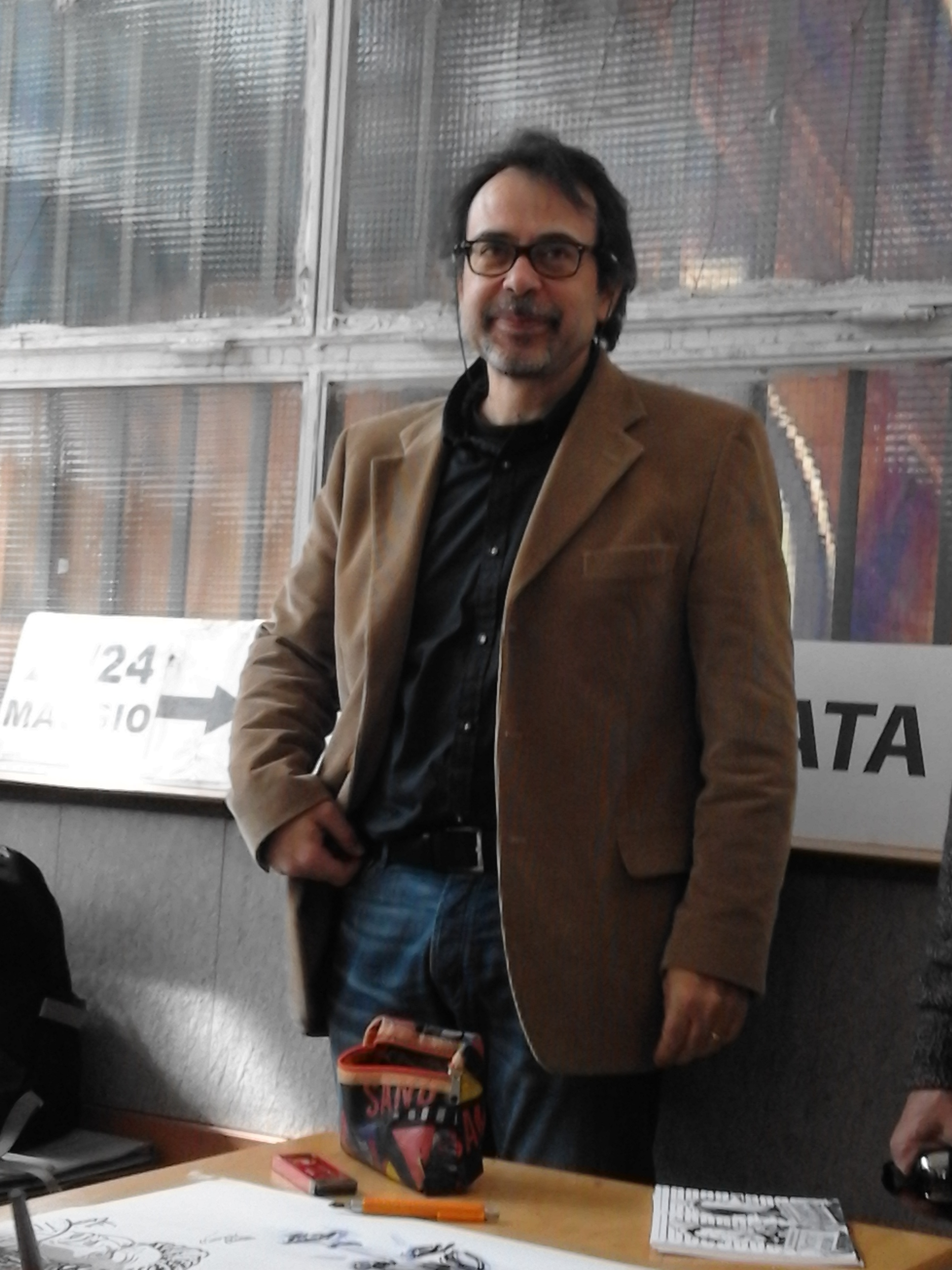 Valerio Piccioni al Torre Spaccata Comics 2016